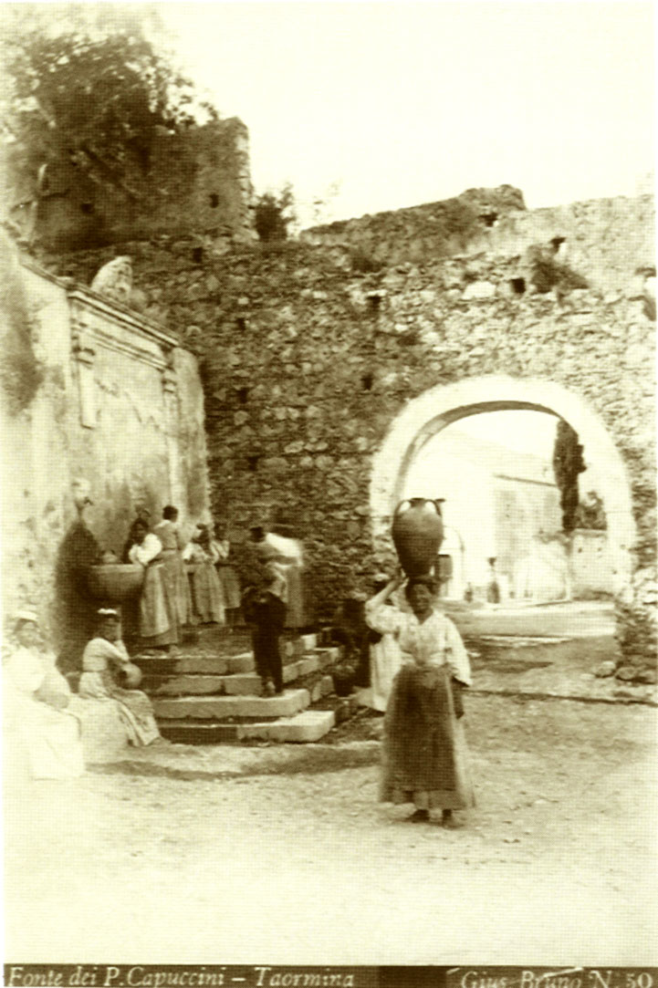 Taormina - Porta dei cappuccini verso il 1890 circa. 1900 ca. 2006.